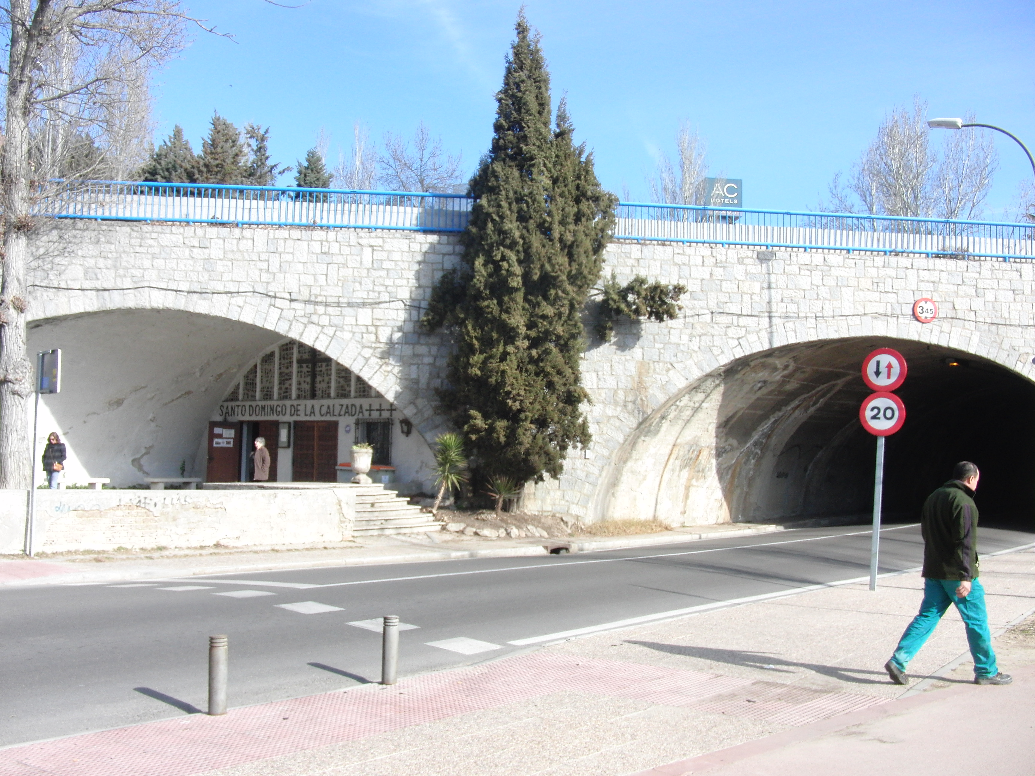 Capilla de Santo Domingo de la Calzada o de el Puente, en la calle Arroyofresno, bajo la avenida del Cardenal Herrera Oria